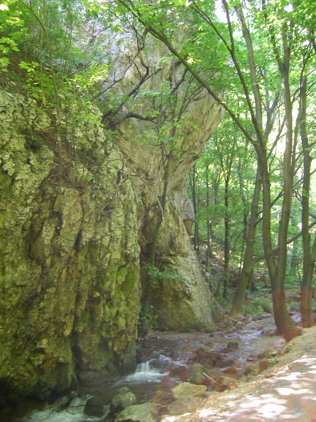 Szádelői-völgy